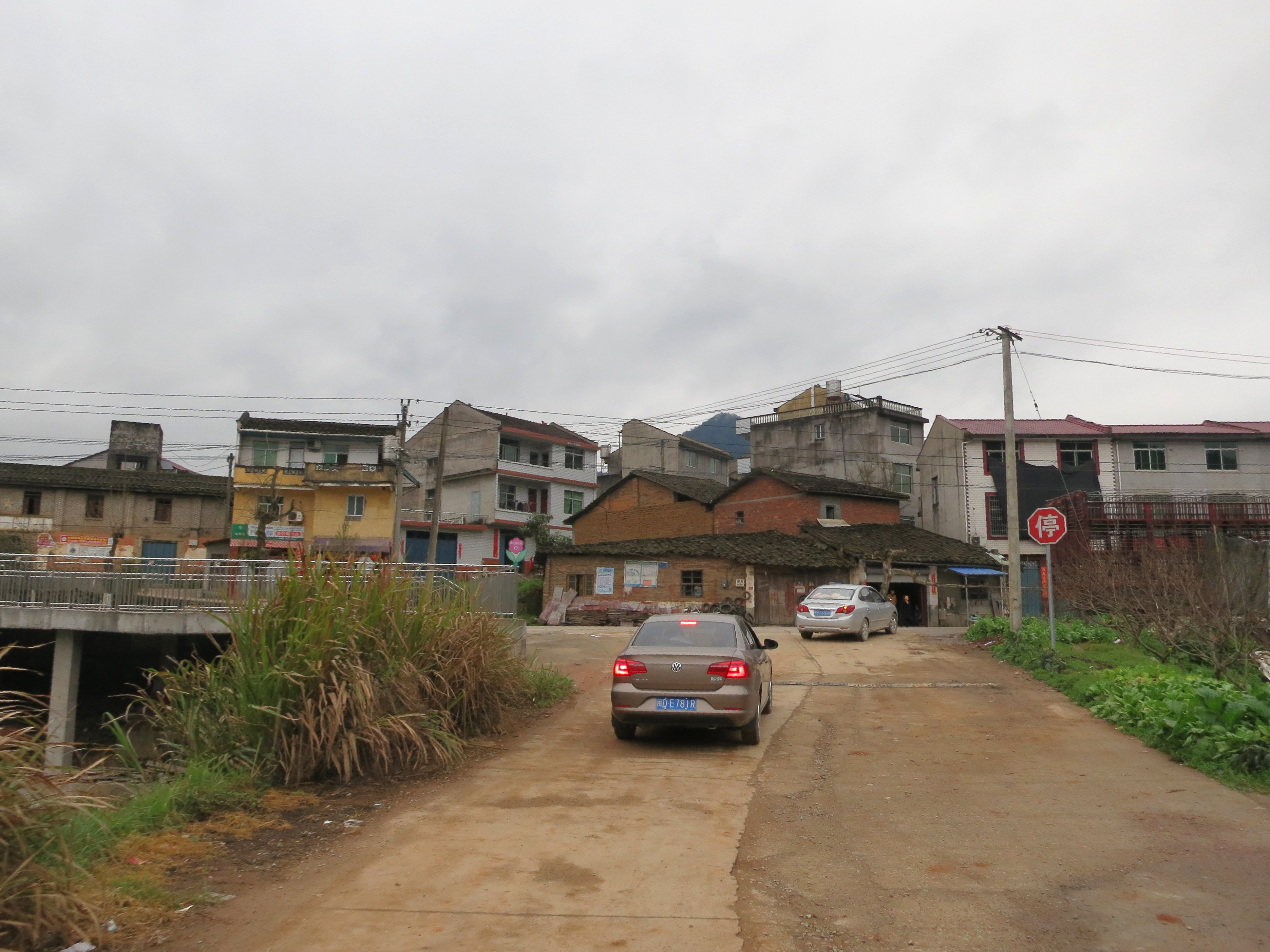 北津村 - Beijin Village - 2016.03